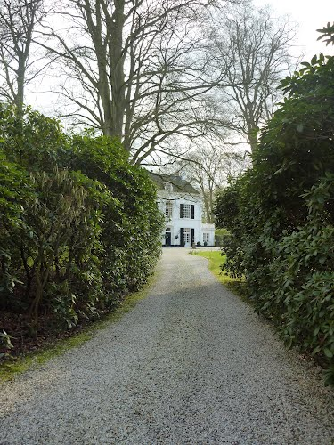 Villa Jagtlust, Eemnesserweg 38, Blaricum (Nederland)